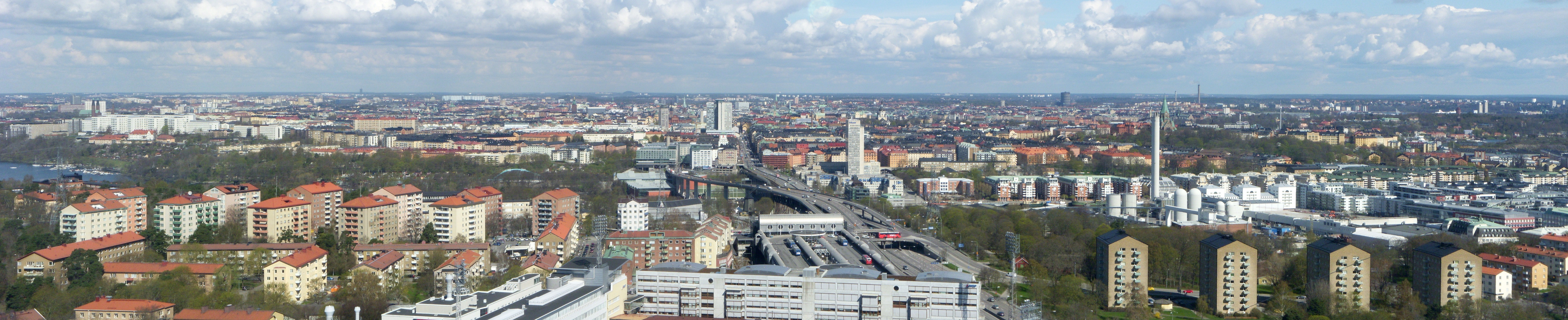 Panorama över södra Stockholm från Globen